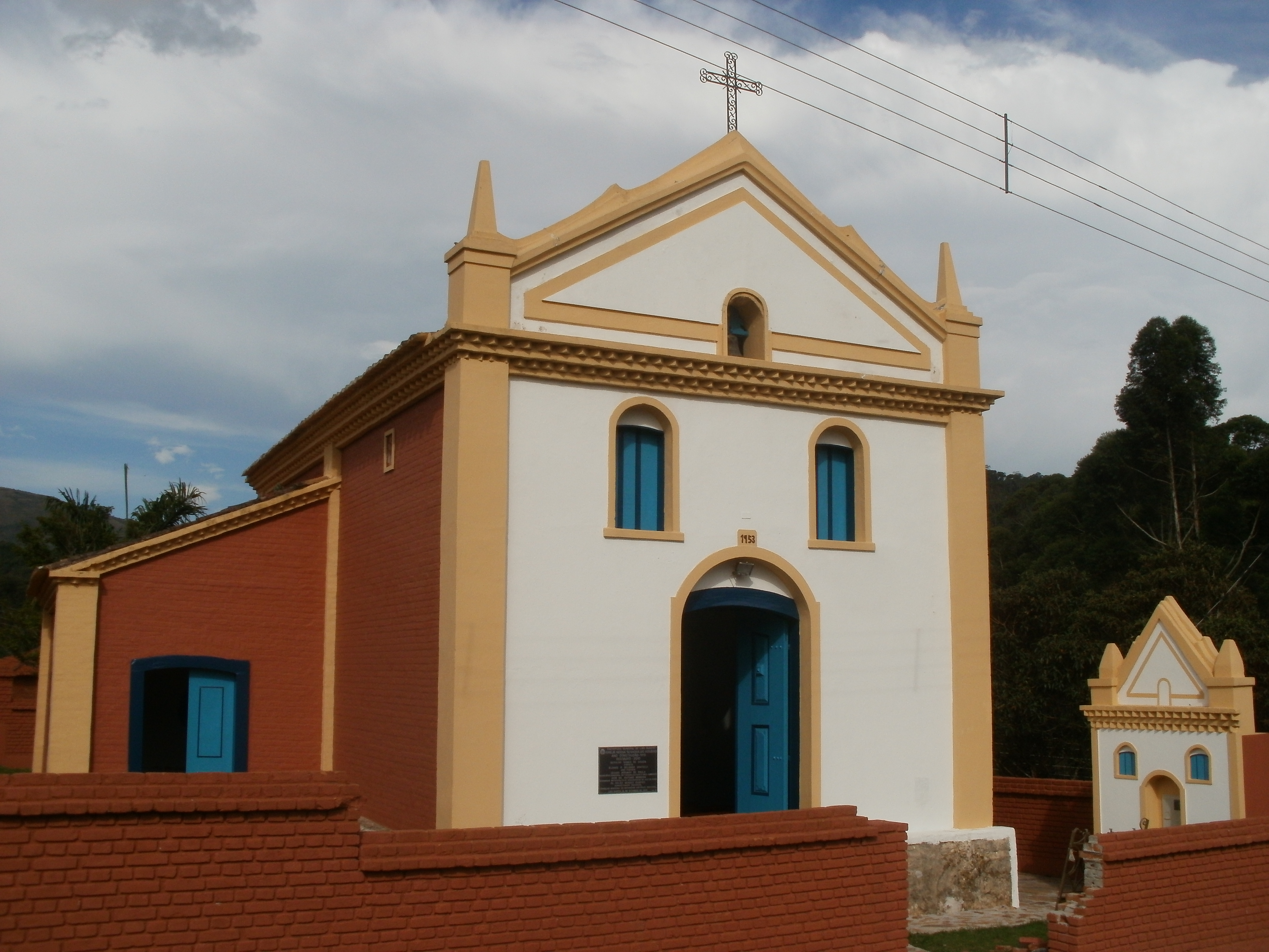 Igreja situada na Praça do Rosário, nas ruas Pedra Aflorada e Laura Moreira. Em Conceição do Ibitipoca, distrito de Lima Duarte, Minas Gerais, Brasil.